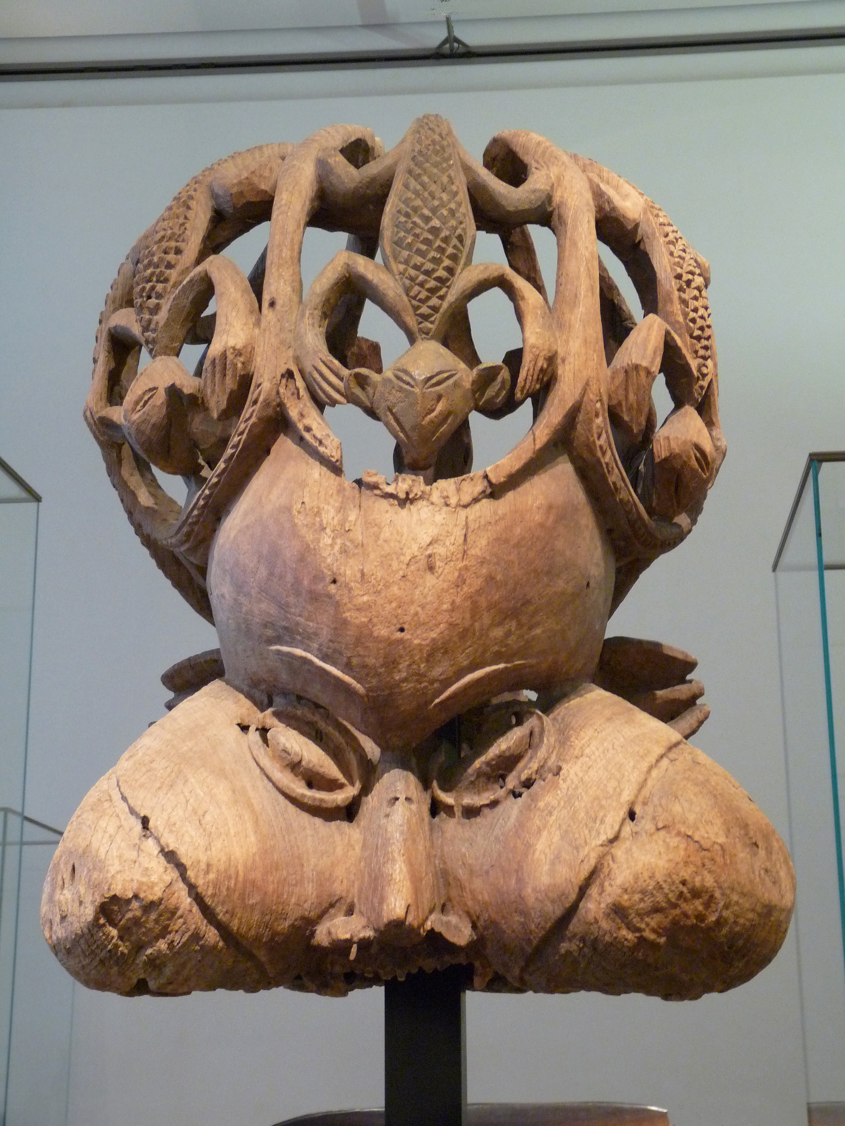 Sculpture bamendou, 18e siècle, région du Nord-Ouest, Cameroun. Masque royal tukah. Bois. Pavillon des Sessions, Louvre, Paris.